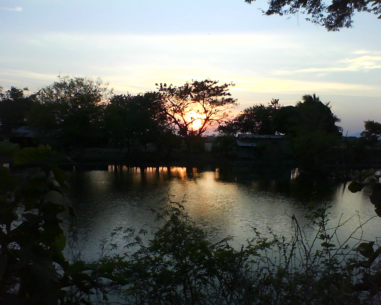 Bello Mi Pueblo